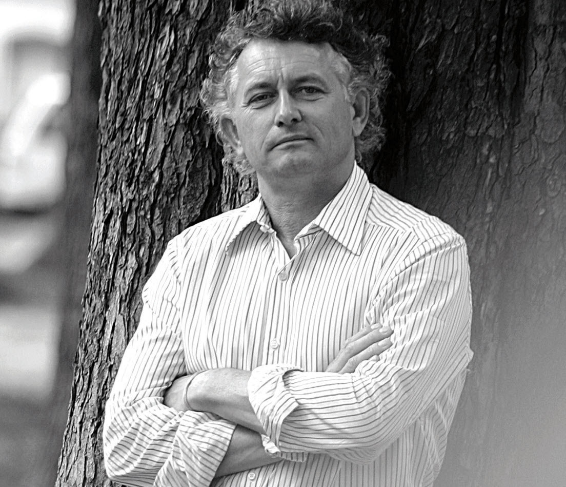 Jacques Rocher